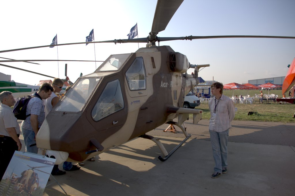 Ansat-2RC armed reconnaisance helicopter.